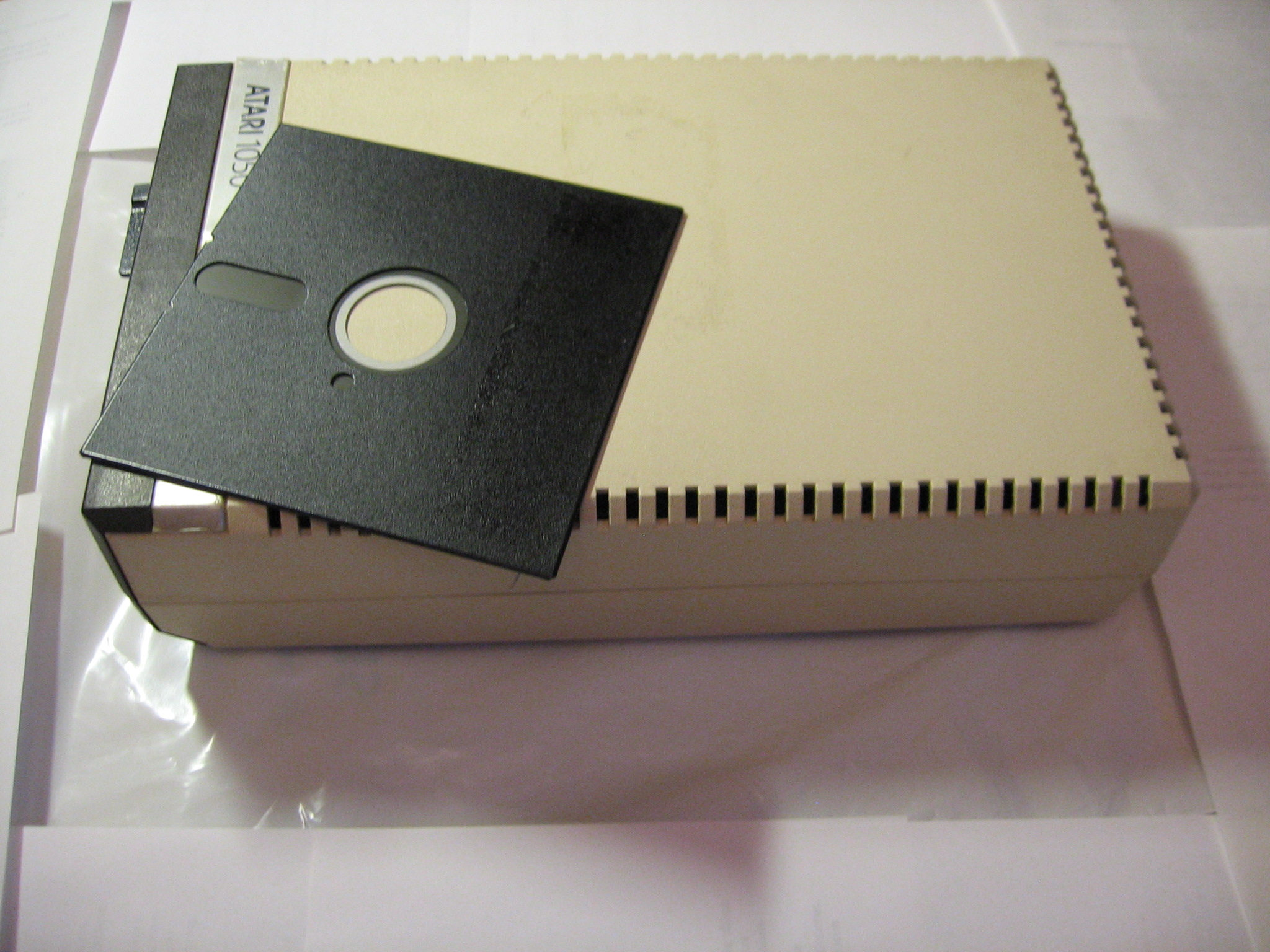 Atari 1050 - передняя панель